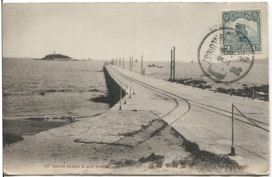 青岛栈桥1910年代